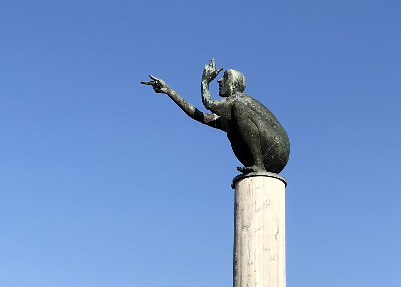 Karl Ulrich Nuss - Späher (Bronze 1999) am Skulpturenpfad Strümpfelbach